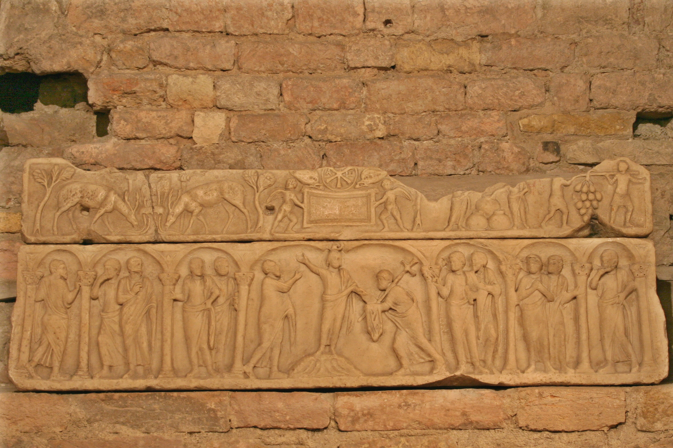 Sarcophage de la première moitié du Ve siècle dit "des compagnes de Sainte Ursule" se trouvant dans les cryptes de l'abbaye de Saint-Victor à Marseille.